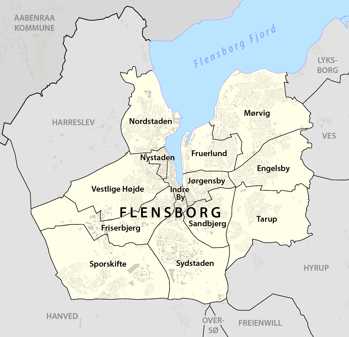 Karte Stadtteile Flensburg